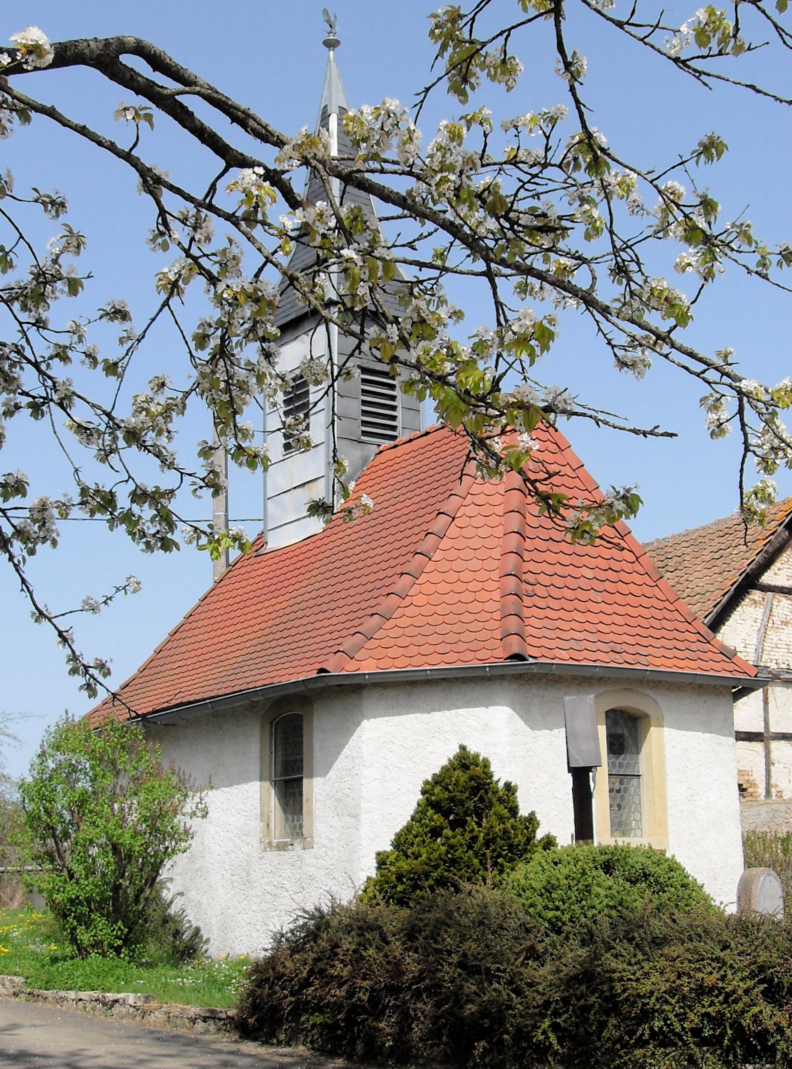 La chapelle Saint-Pierre et Saint-Paul d'Elbach